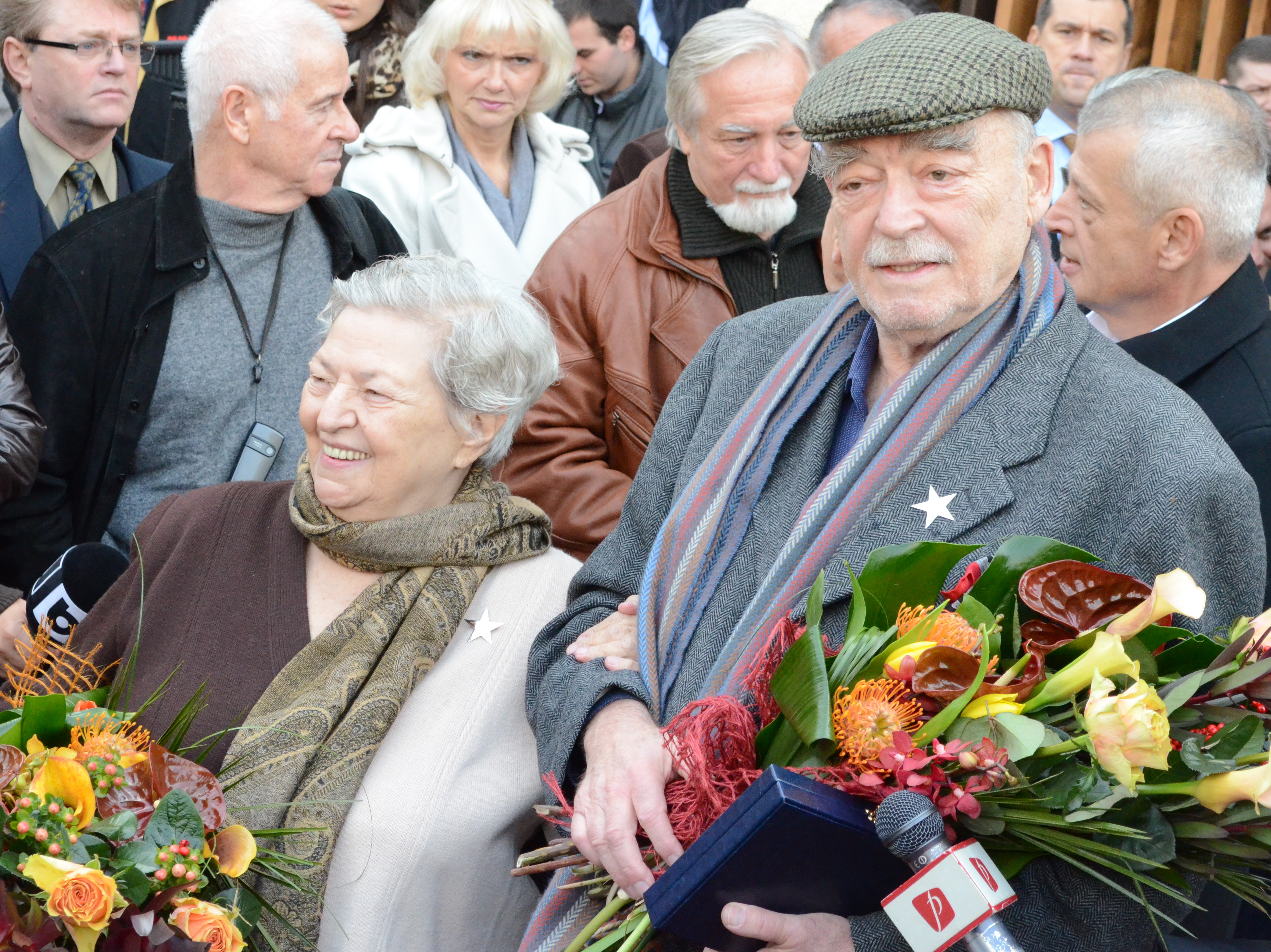 Draga Olteanu Matei și Mircea Albulescu primesc câte o stea în Piața Timpului din București